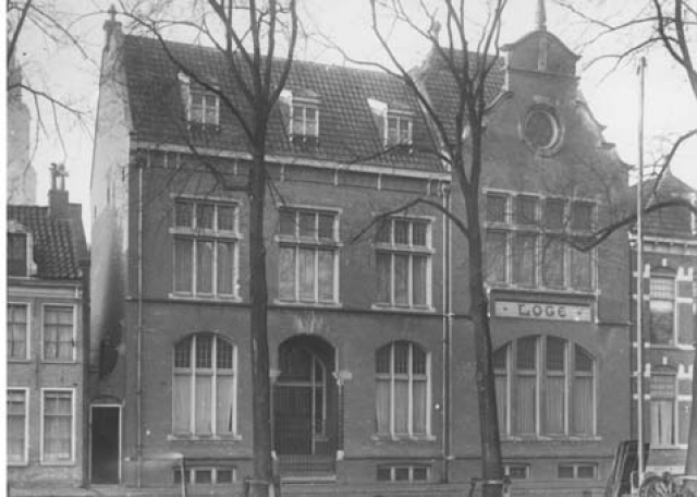 Voormalig logegebouw van de vrijmetselaarsloge L'Union Provinciale aan de Turfsingel in Groningen, 1920. Het pand werd ontworpen door N.W. Lit, J.A. Mulock Houwer en G. Nijhuis (zelf leden van de loge) en was in gebruik van 1905 tot 1993, toen het is gesloopt ten behoeve van nieuwbouw van het Provinciehuis.